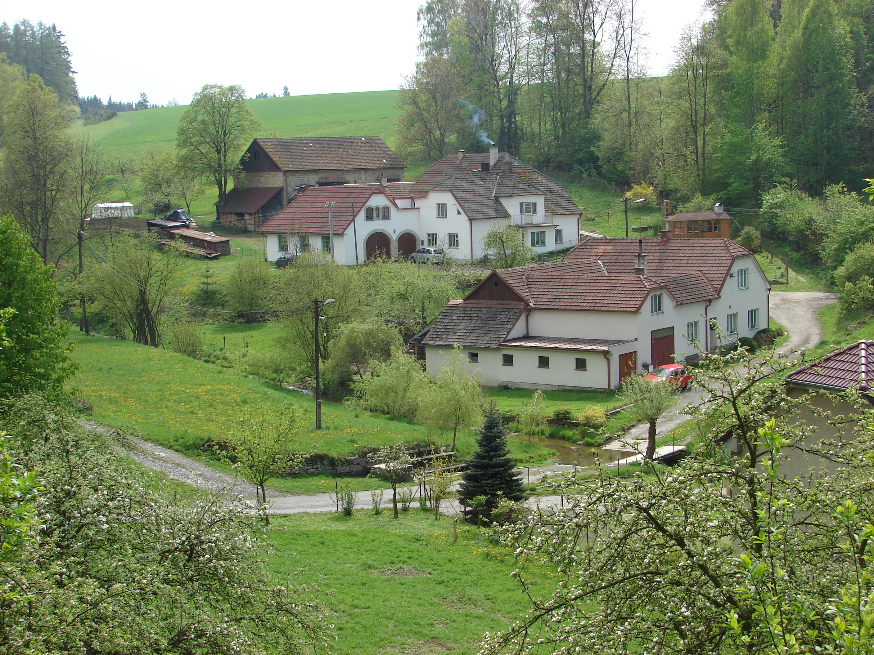 obec